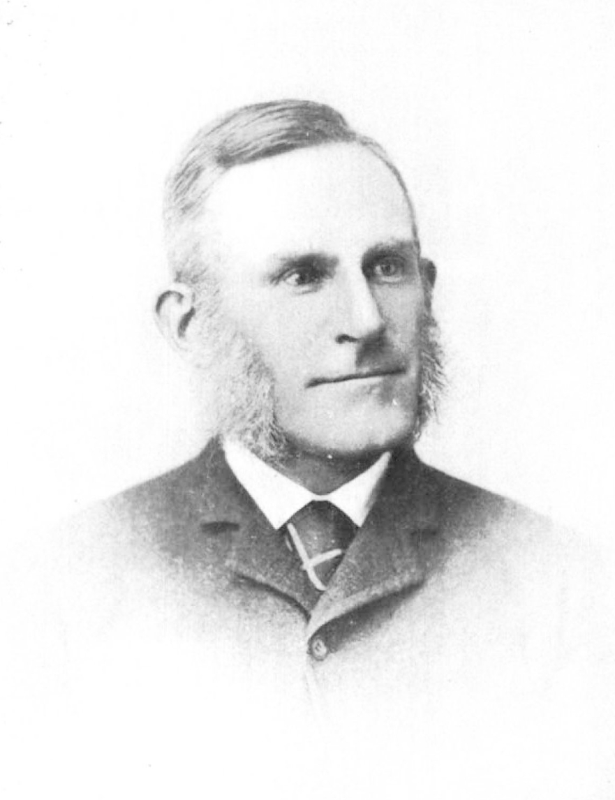 Samuel Hubbard Scudder (1837-1911), Entomologiste américain.